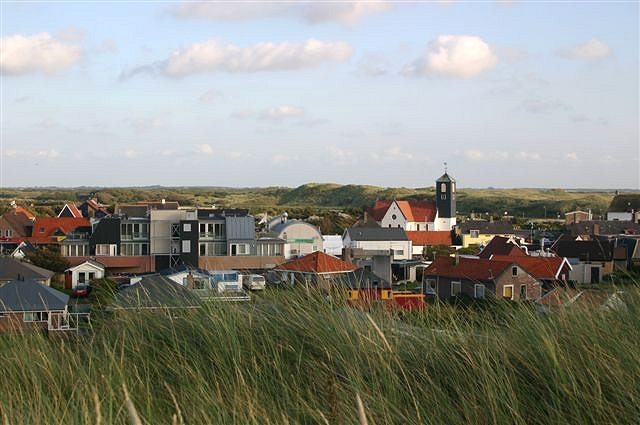 Blick auf die Ortsmitte